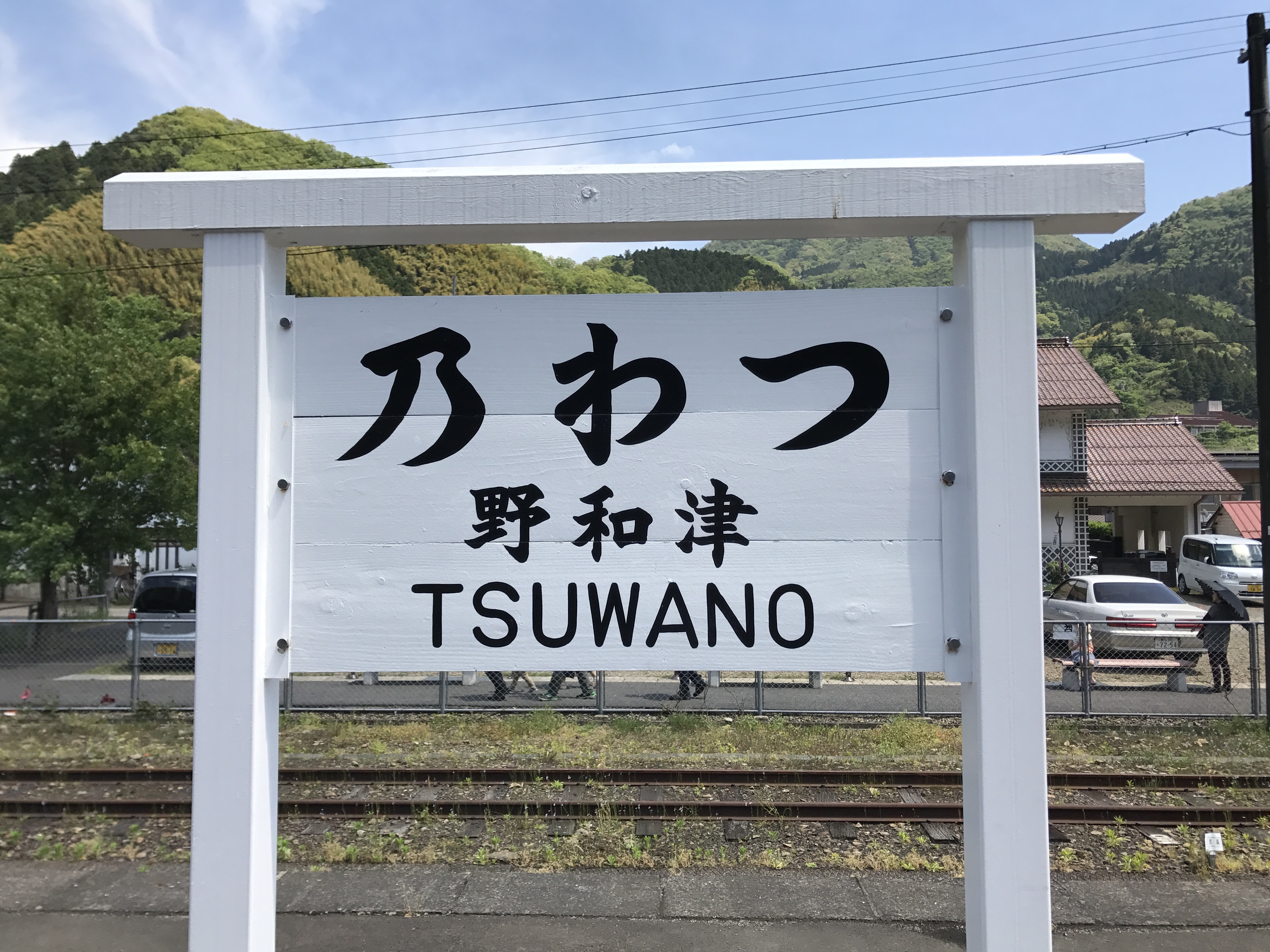 津和野駅の観光用駅名標